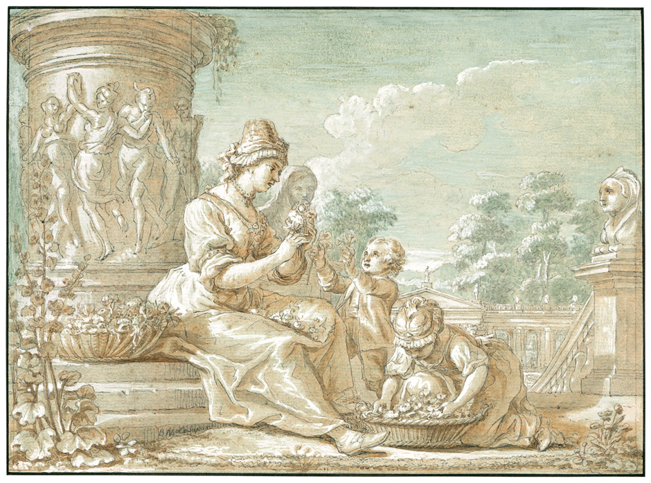 Allegorie des Sommers. Junge Frau mit zwei Kindern beim Blumenbinden in einem Palastgarten. Federzeichnung, 20,5 x 27,8 cm. Auf dem unteresten Treppenabsatz links unten von fremder Hand bez. "B N Le Sueur".